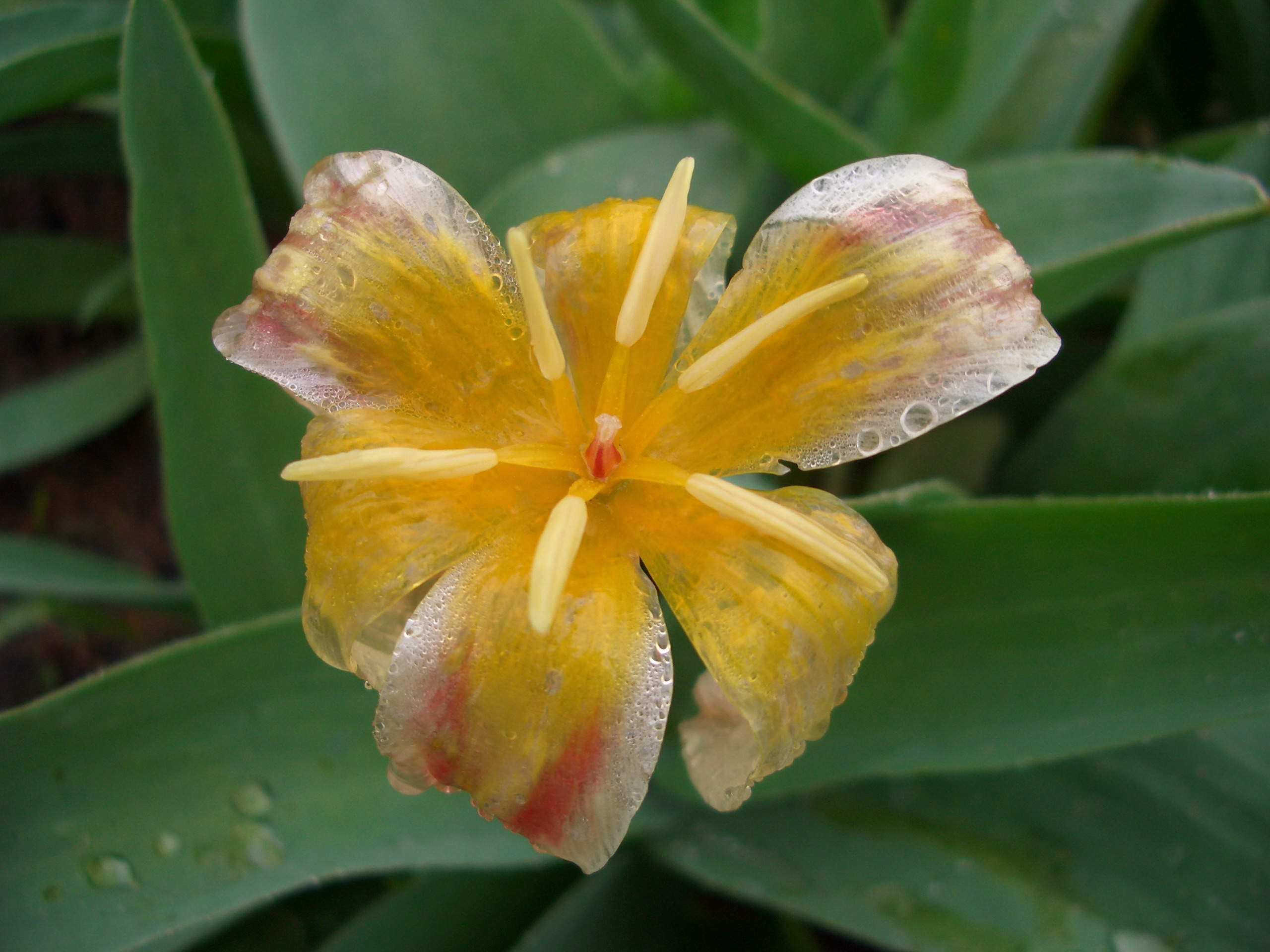 Kaufmanns Tulpe (Tulipa kaufmanniana) im Botanischen Garten zu Berlin